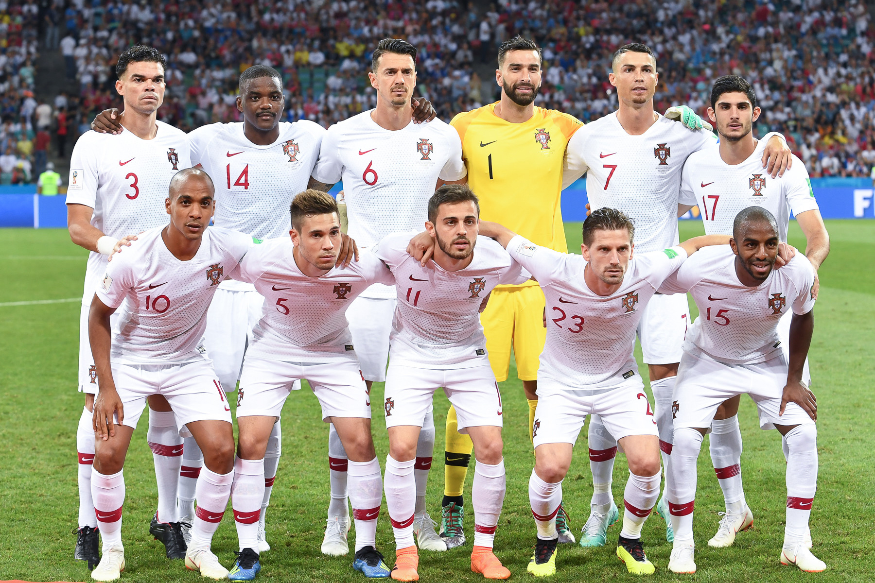 День, когда Роналду попрощался с ЧМ. Кавани и Суарес идут дальше